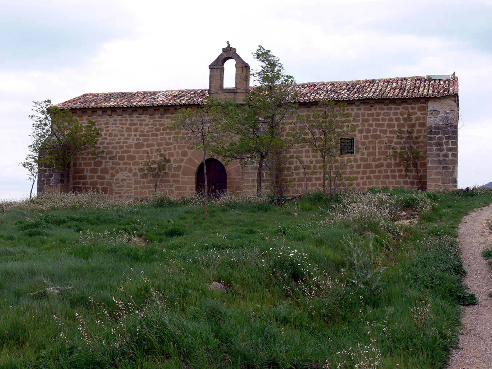 Ermita de Santa María de Cillas en Sajazarra, La Rioja (España)